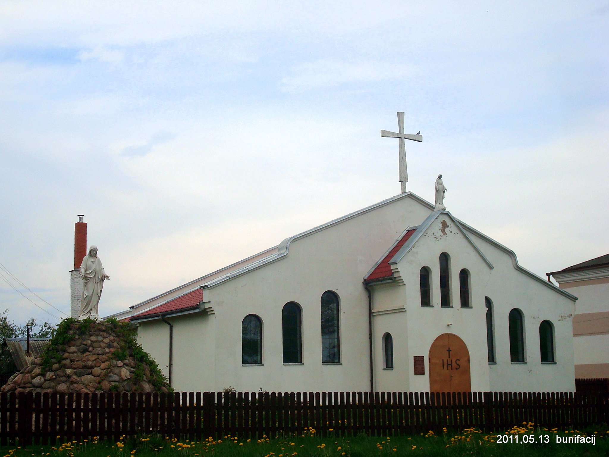 Костёл в Ветрино